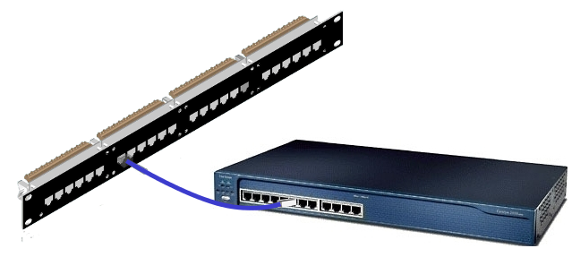 Схема построения СКС интер-коннект